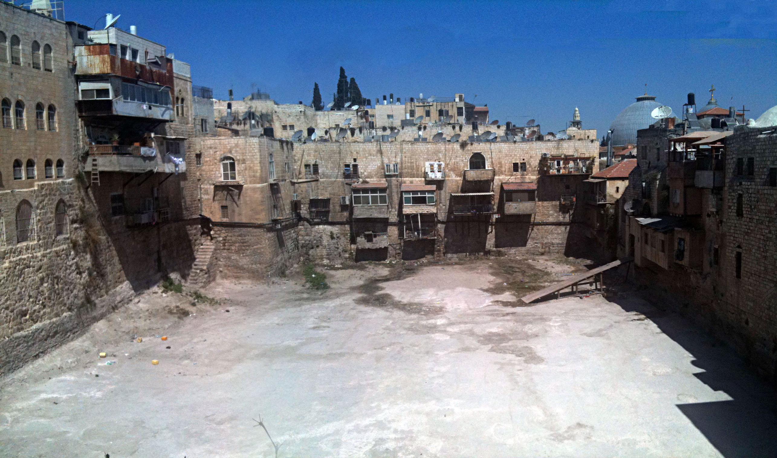 מאגר מים עצום ועתיק, כנראה מימי בית שני, הידוע בשם בריכת חזקיהו או בריכת הפטריארך (אל בטארק בערבית) יש החושבים כי זו בריכת המגדלים (אמיגדלון) המוזכרת אצל יוספוס פלביוס. נמצאת מצפון לרח' דוד ועד החאן הקופטי ברובע הנוצרי. גבולה המזרחי: חנויות רח' הנוצרים. נסתרת מעין כיום מלבד חלונות פרטיים. נוקתה ב-2012 ע"י עיריית ירושלים אחרי שהייתה מקום לזריקת אשפה במשך שנים רבות.